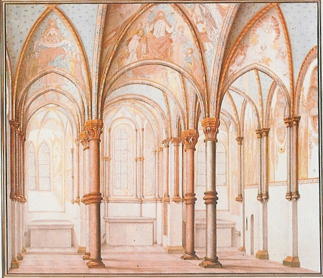 Innenansicht der Georgskapelle mit frühgotischen Wandmalereien